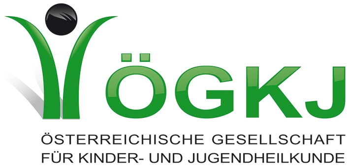 Logo der Österreichischen Gesellschaft für Kinder- und Jugendheilkunde